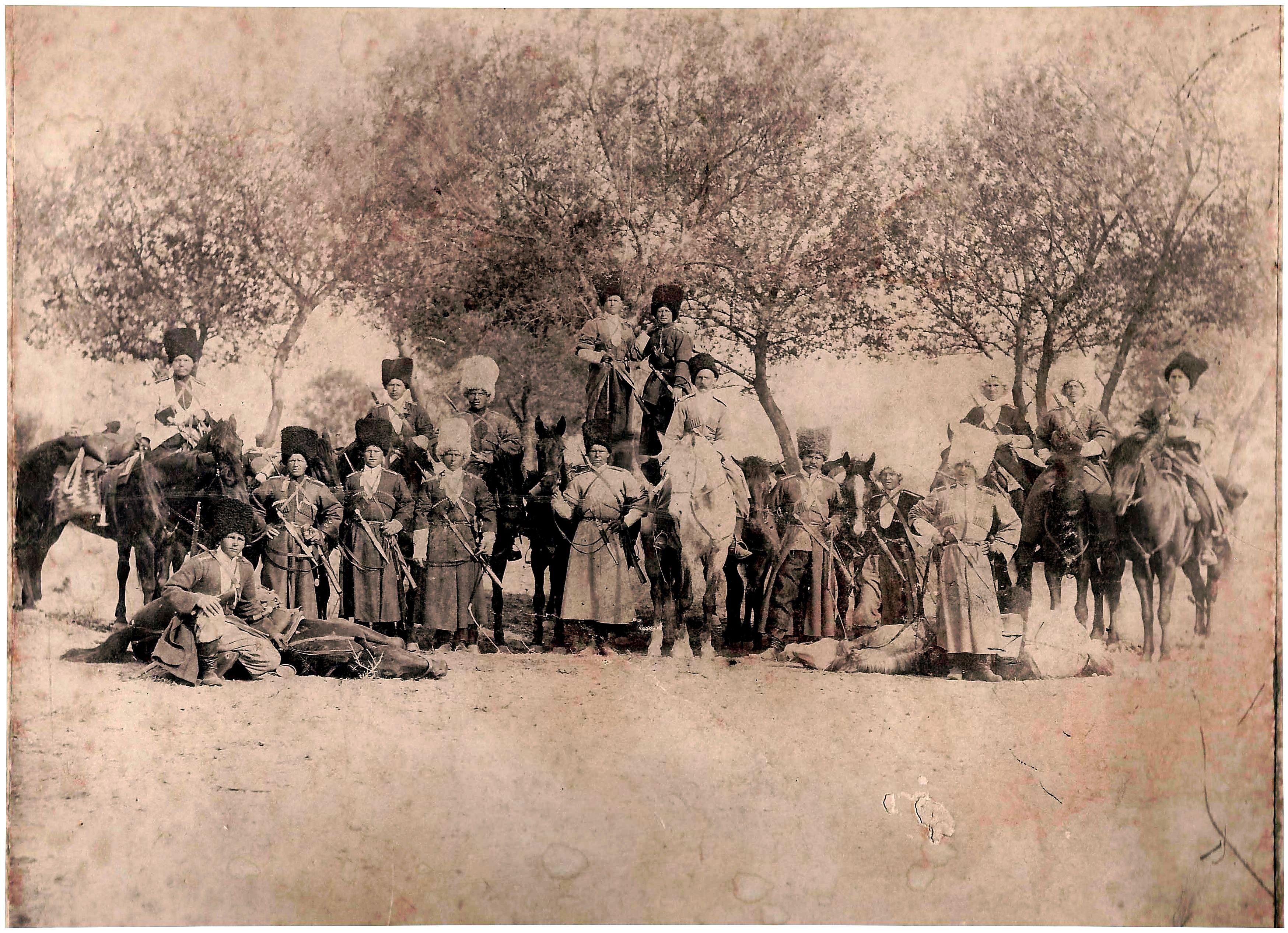 Казаки Закаспийской казачьей бригады.